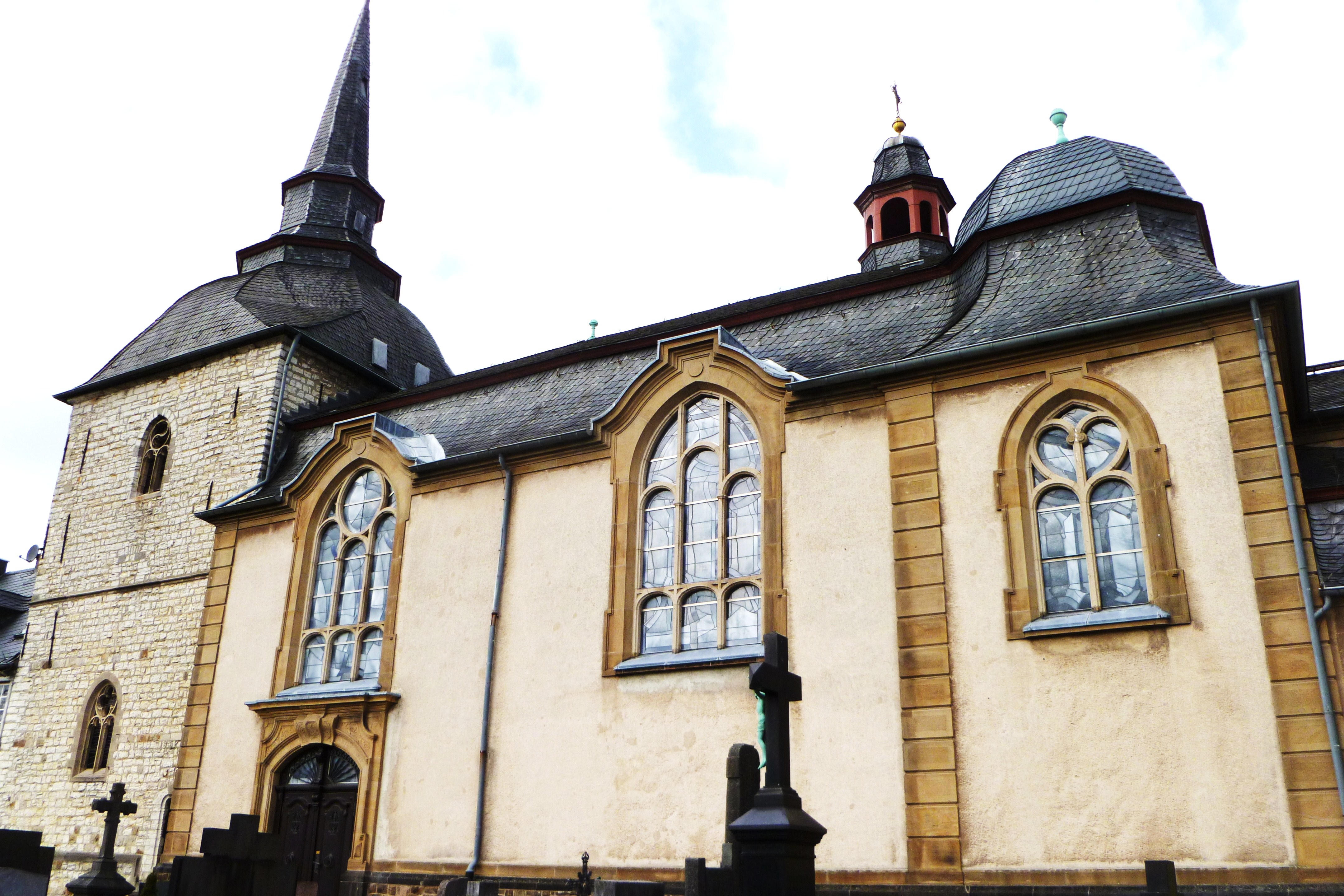 Baudenkmal in Aachen-Laurensberg